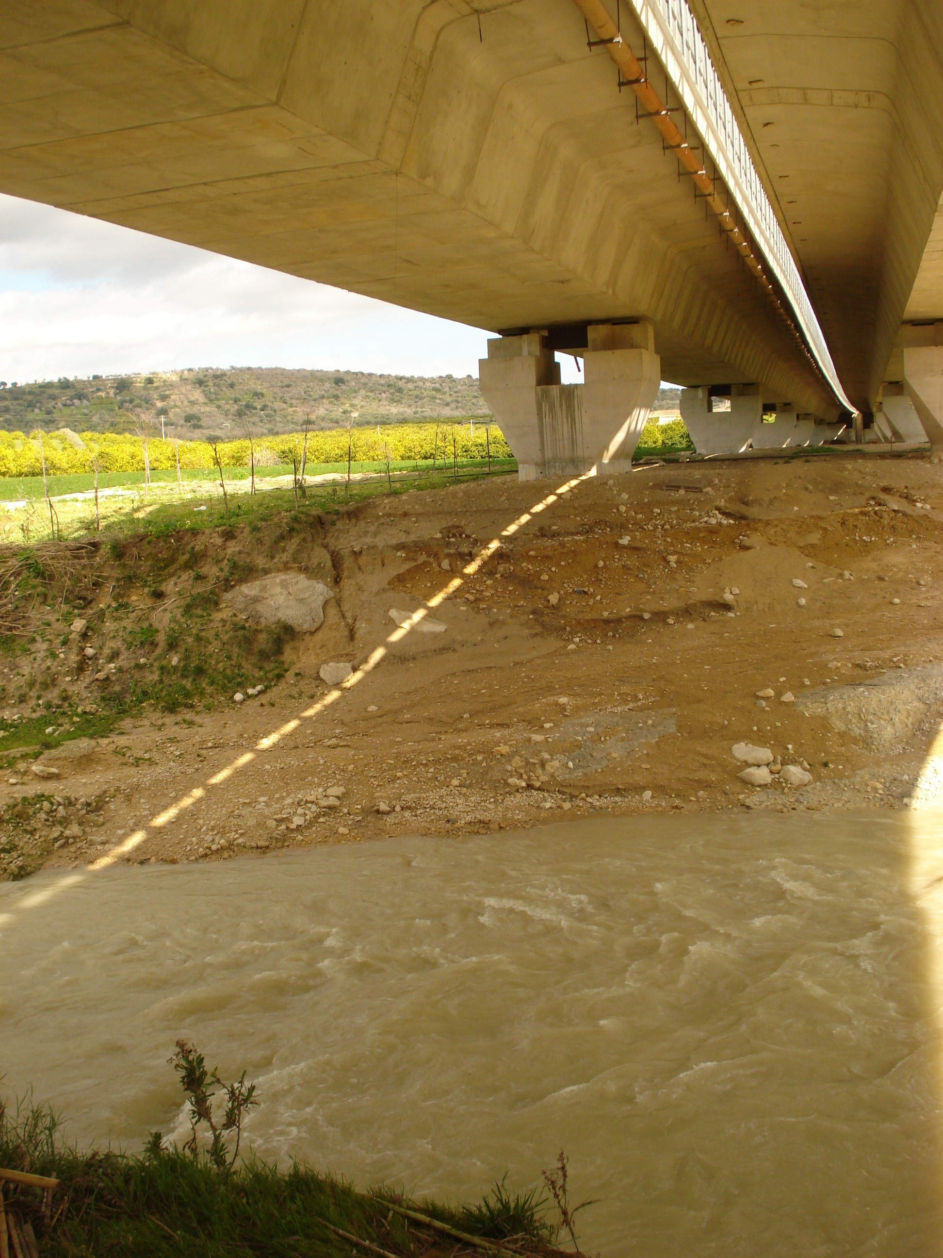 Risalendo il Tellaro, è qui il primo punto in cui il fiume è guadabile a piedi, a cavallo o su fuoristrada; si tratta del Passo di Miele, dove è probabile sia avvenuta la disfatta ateniese (413 a.C.) ad opera dei Siracusani.